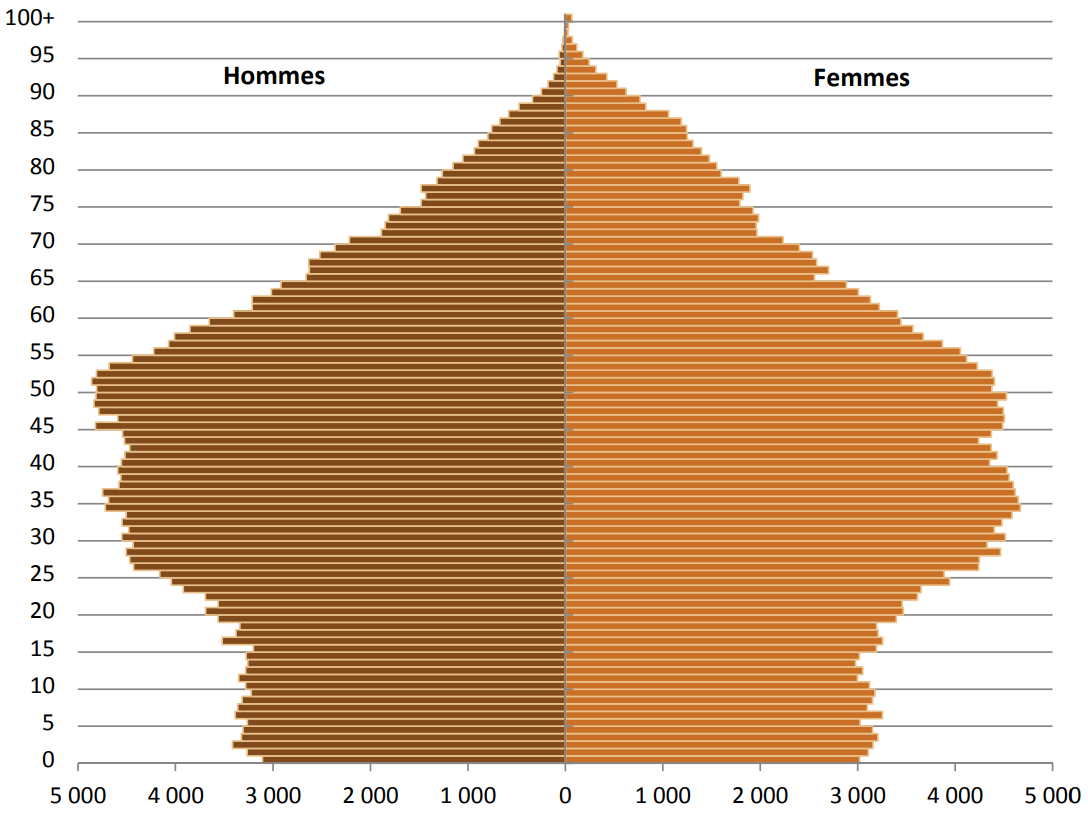 Половозрастная пирамида Люксембурга